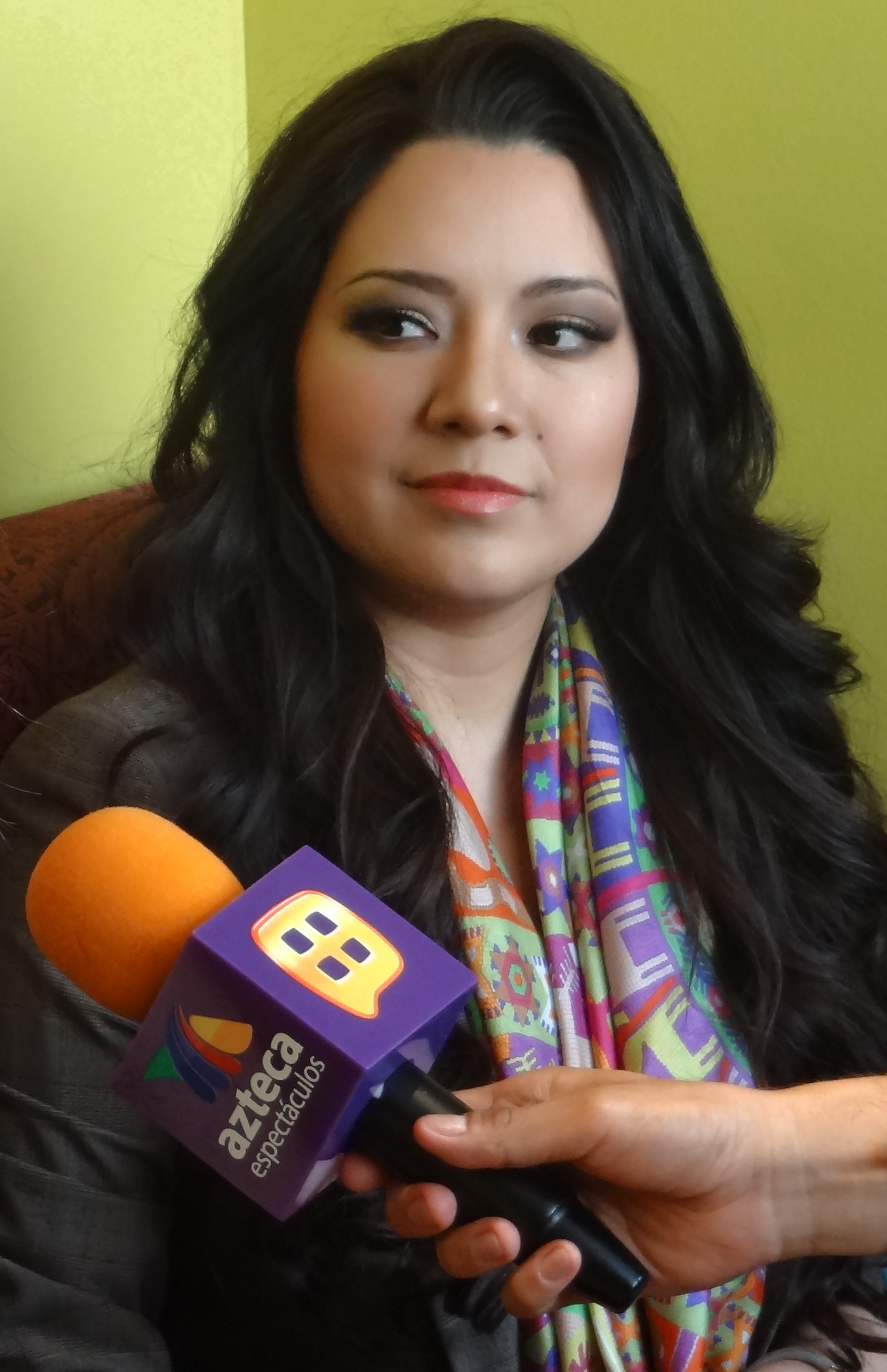 Nadia Yvonne López durante una entrevista en 2015.